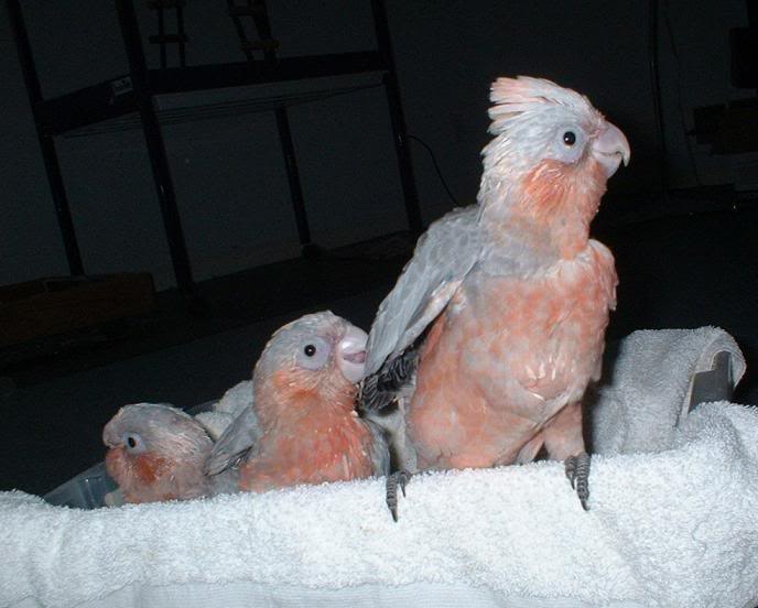 Galatiel yavruları